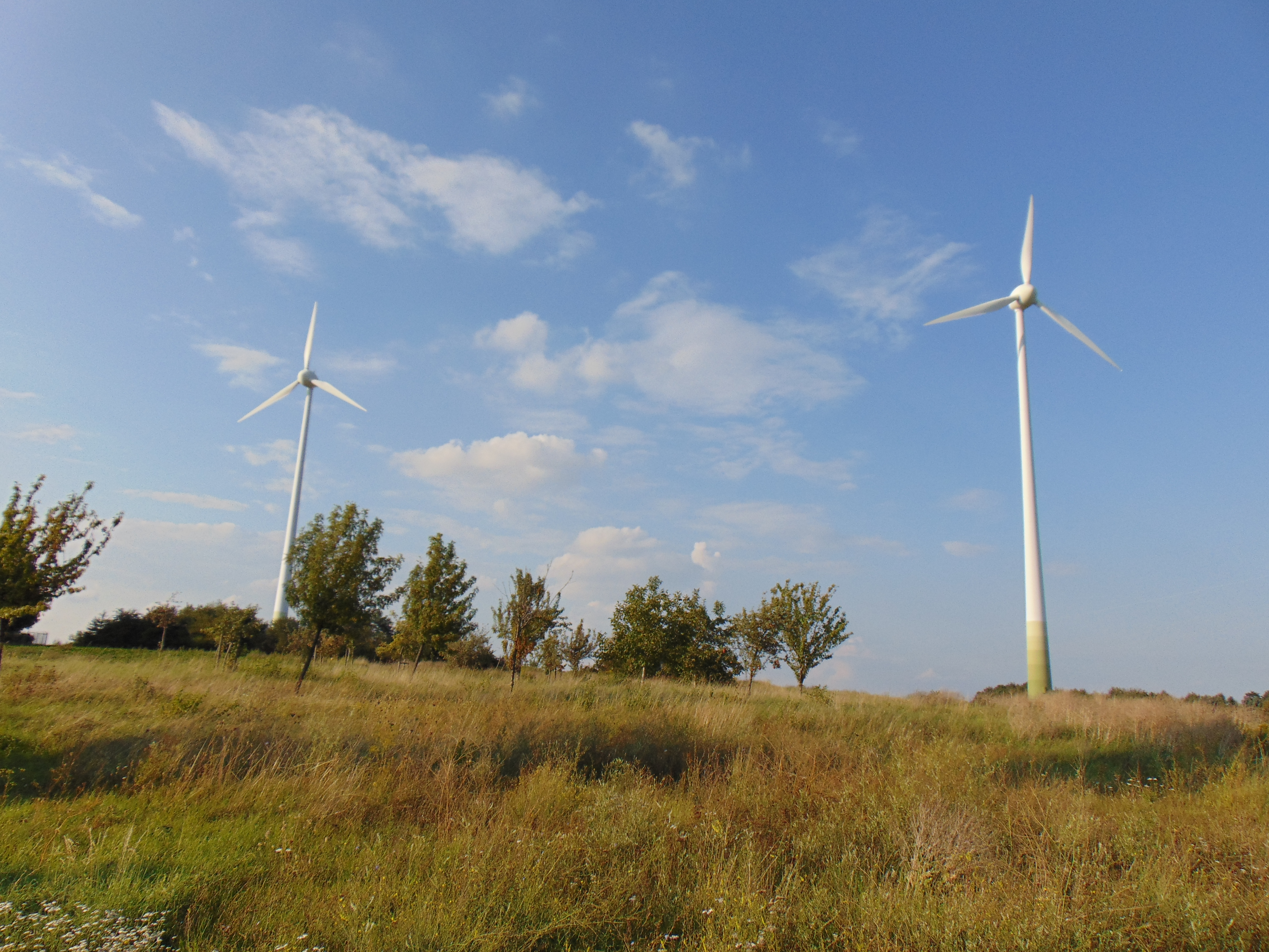 Zwei Enercon E-40 (Neues Design ab 2001) mit 600 kW Nennleistung und 44 m Rotordurchmesser auf 76-m-Türmen in Mainz-Ebersheim, Rheinland-Pfalz, Deutschland